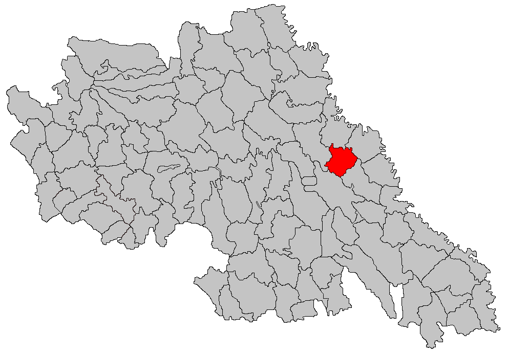 Categorie:Hărţi ale judeţului Iaşi